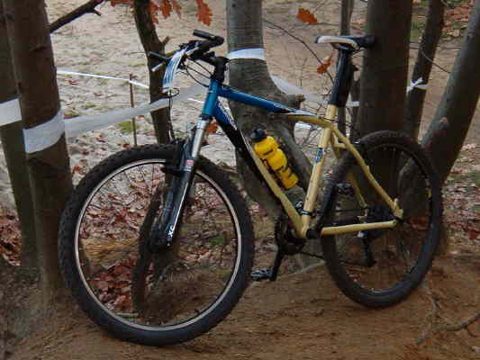 Un vélo